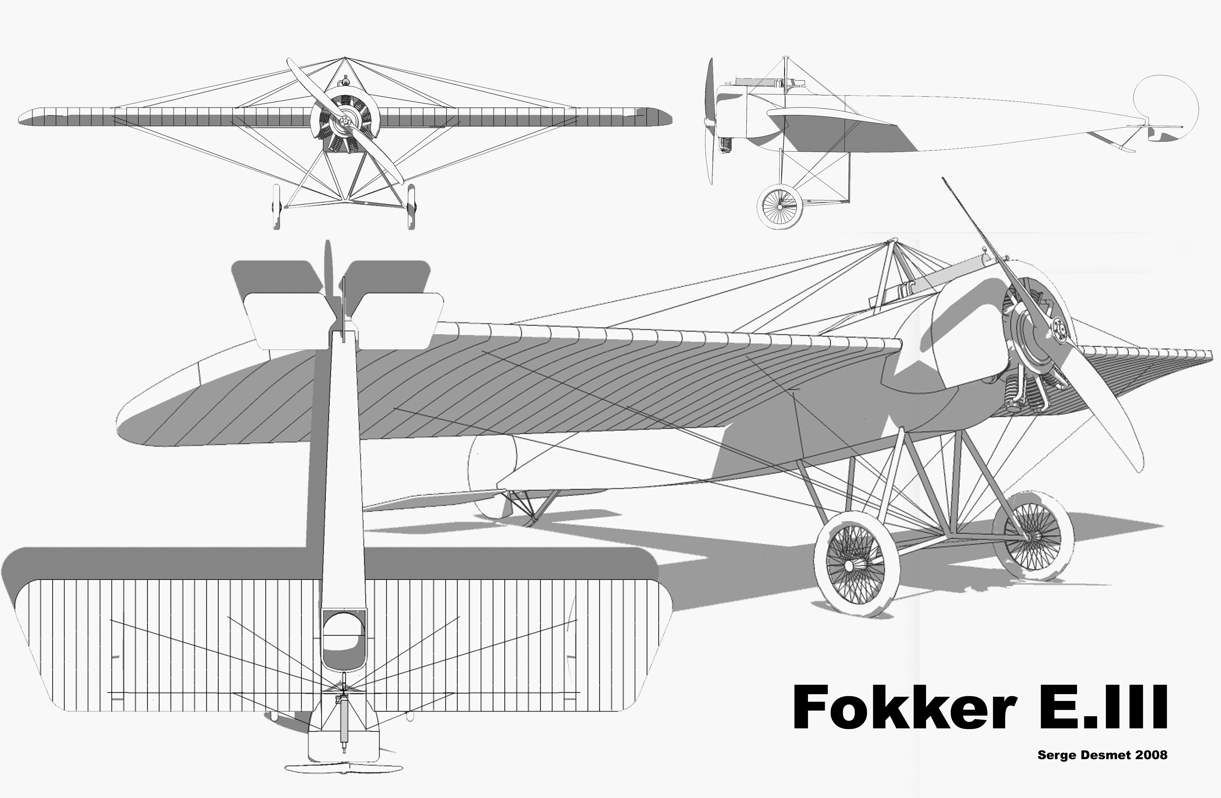 Plan 3 vues du Fokker E.III